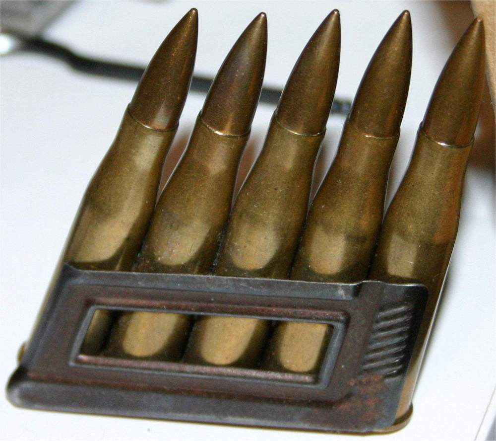 Okvirček s petimi 8x56R Mannlicher naboji.